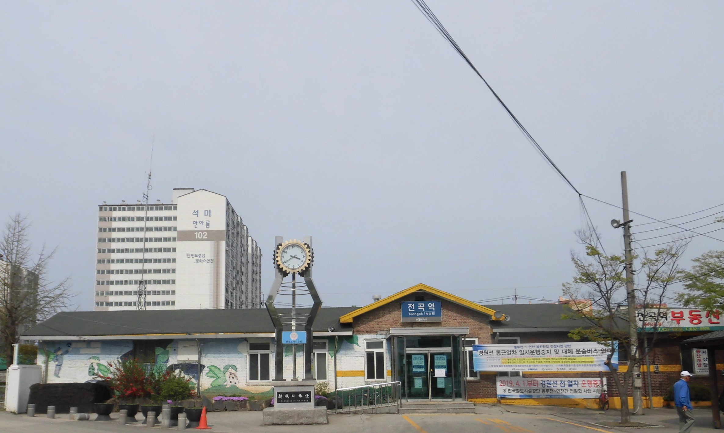 경기도 연천군에 있는 전곡역